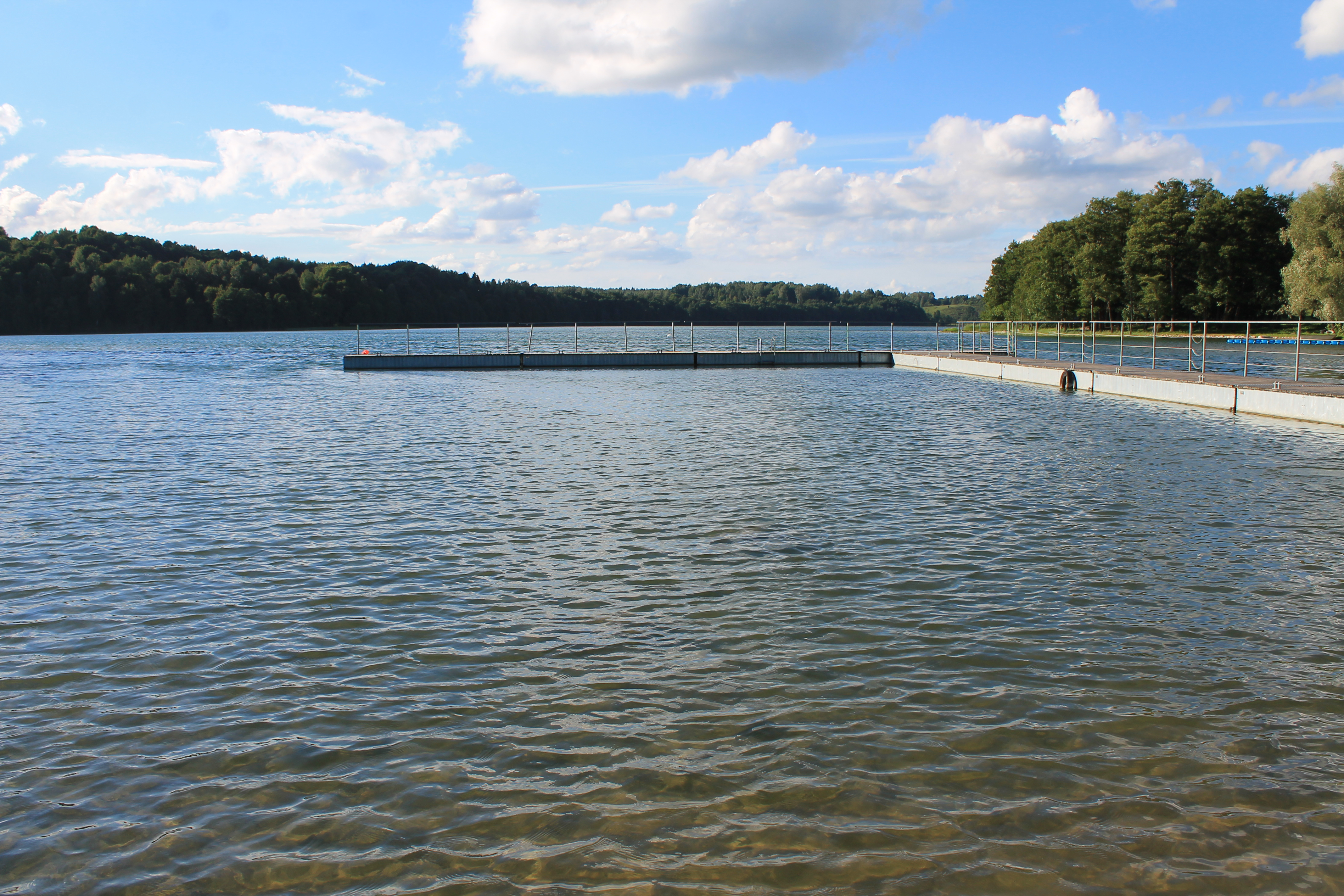 Jezioro Hańcza